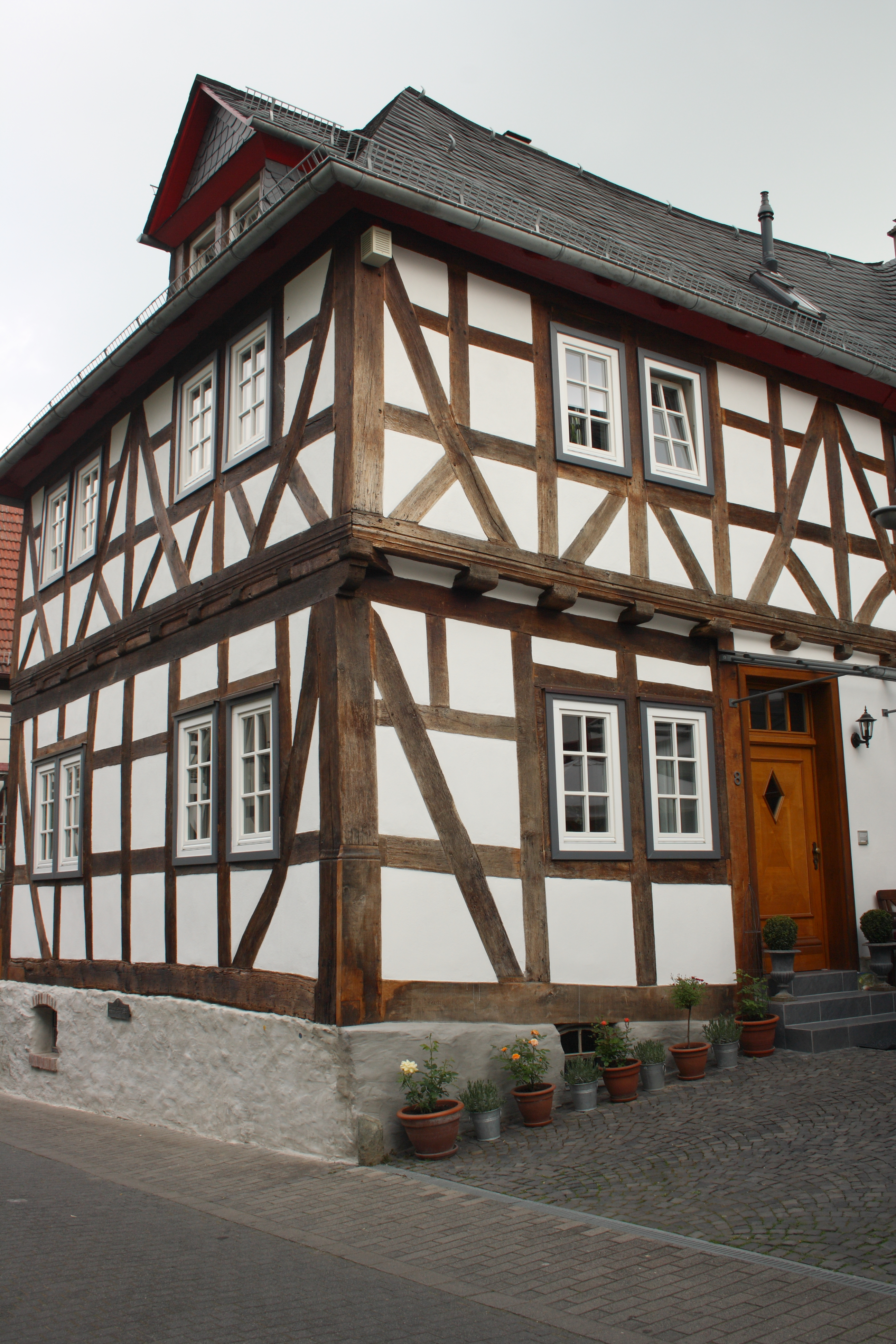 Haus Belzgasse 6/8 in Braunfels im Lahn-Dill-Kreis (Hessen)